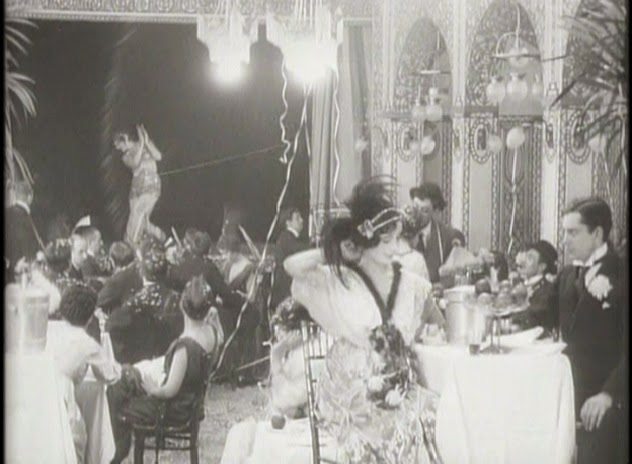 Кадр из фильма «Дитя большого города» (1914)